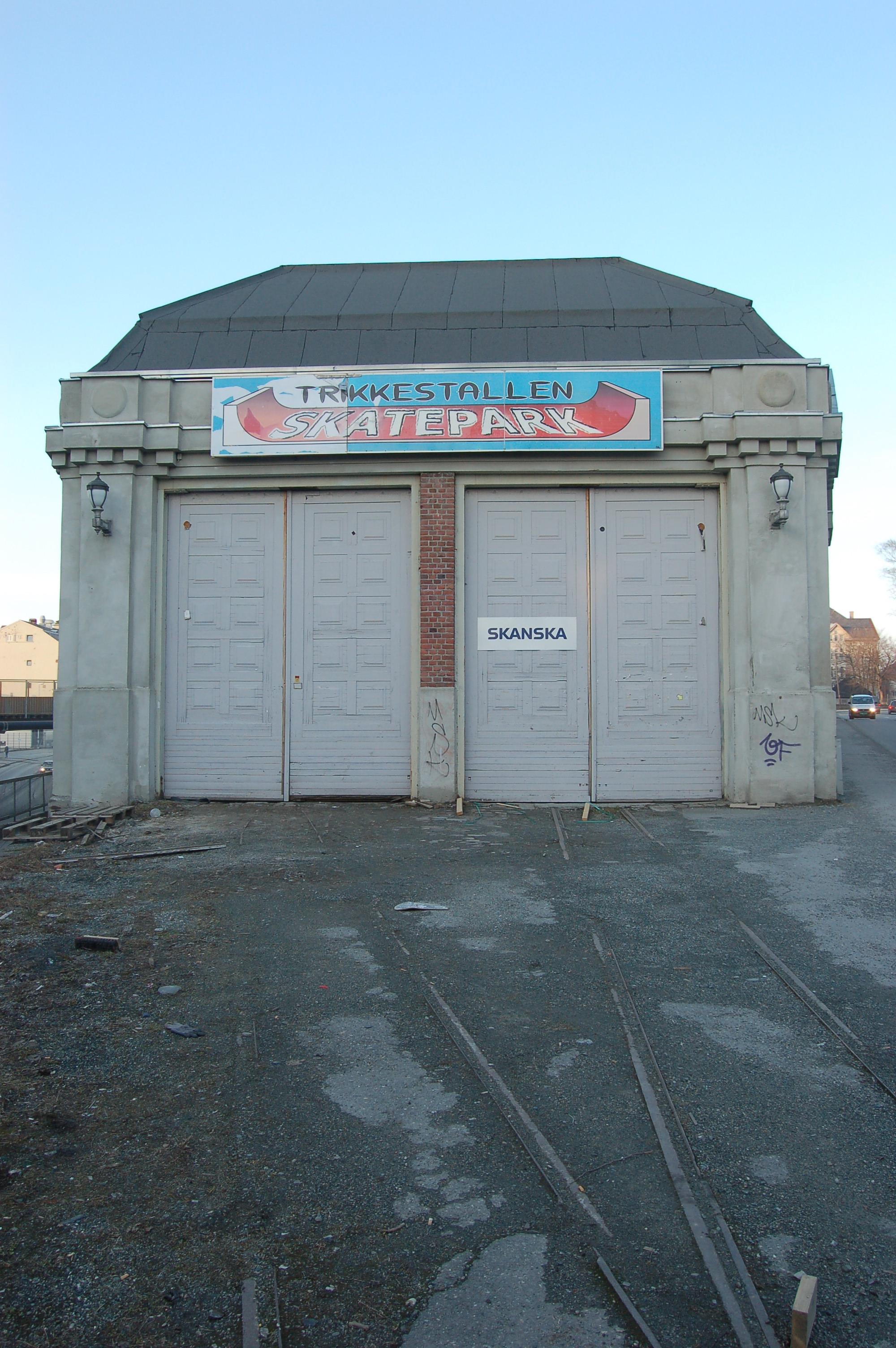 Voldsminde tram depot in Trondheim, Norway